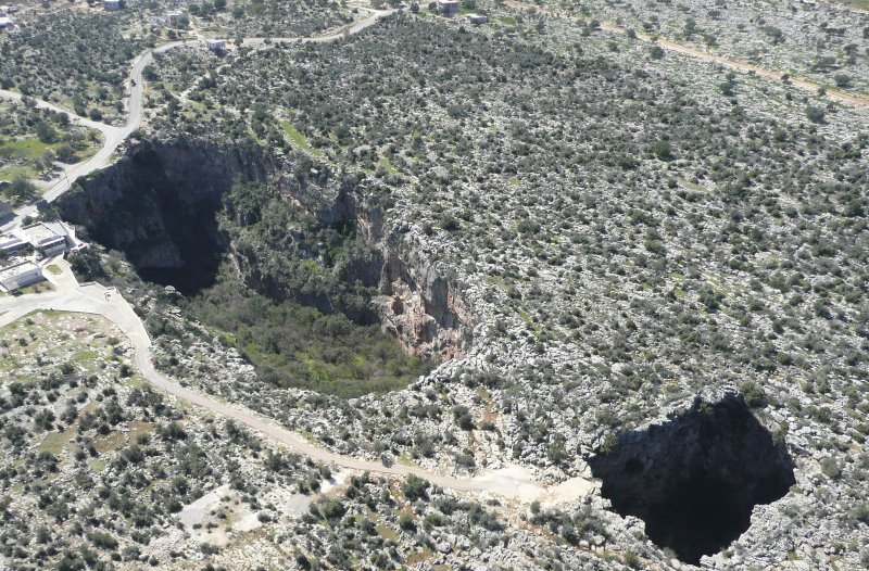 Cennet ve Cehennem, vista aerea